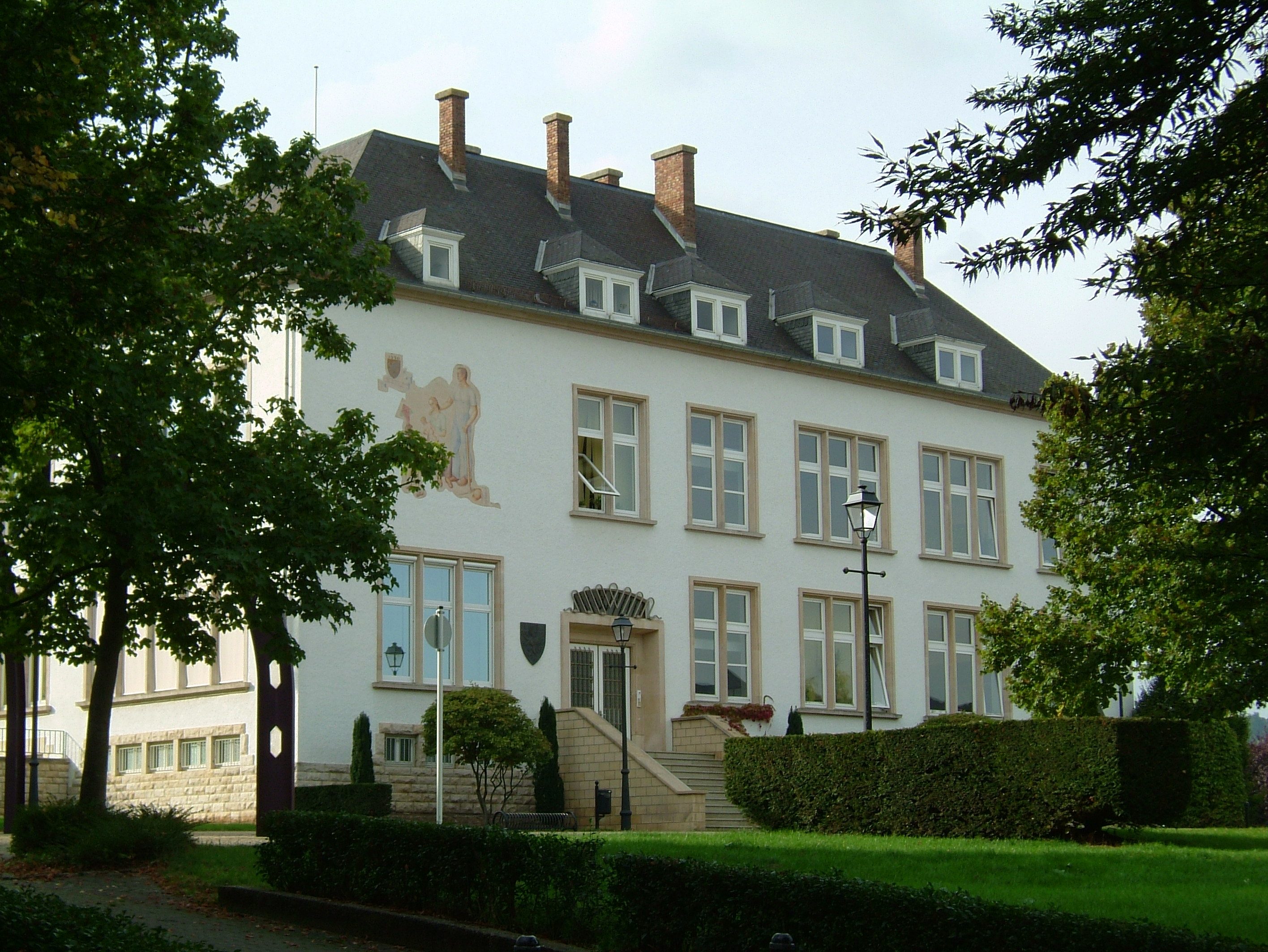 Gemeng Käl .